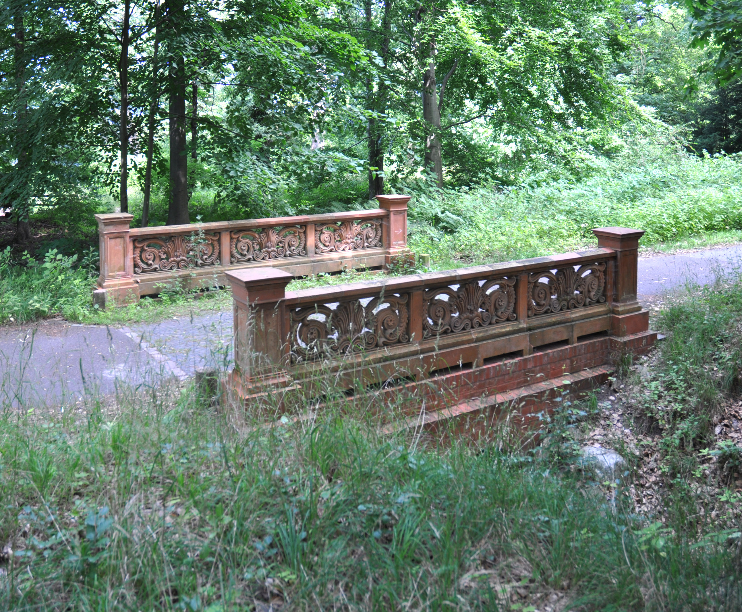 Die Töpferbrücke im Verlauf des Drives